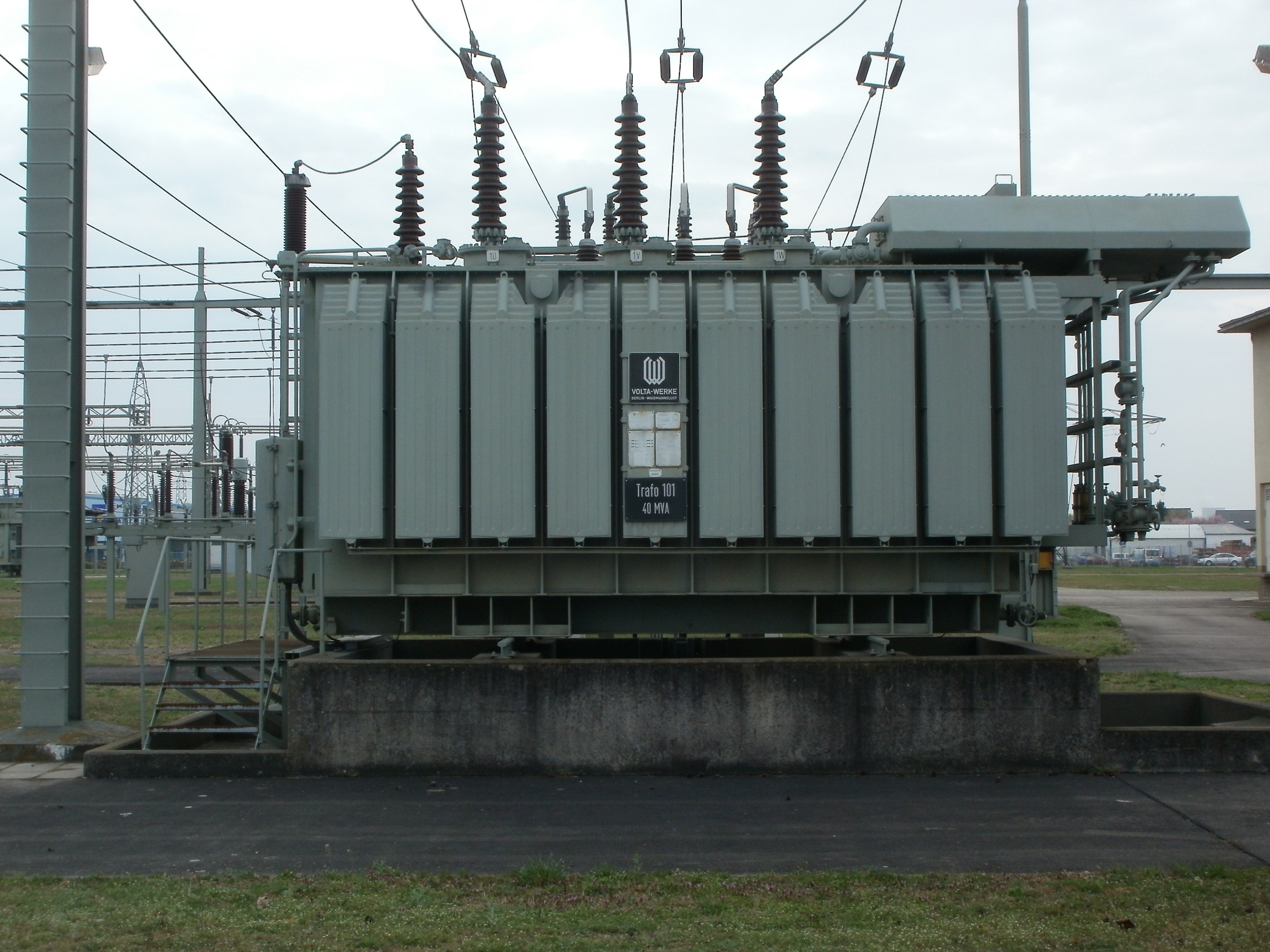 Umspannwerk Altlußheim